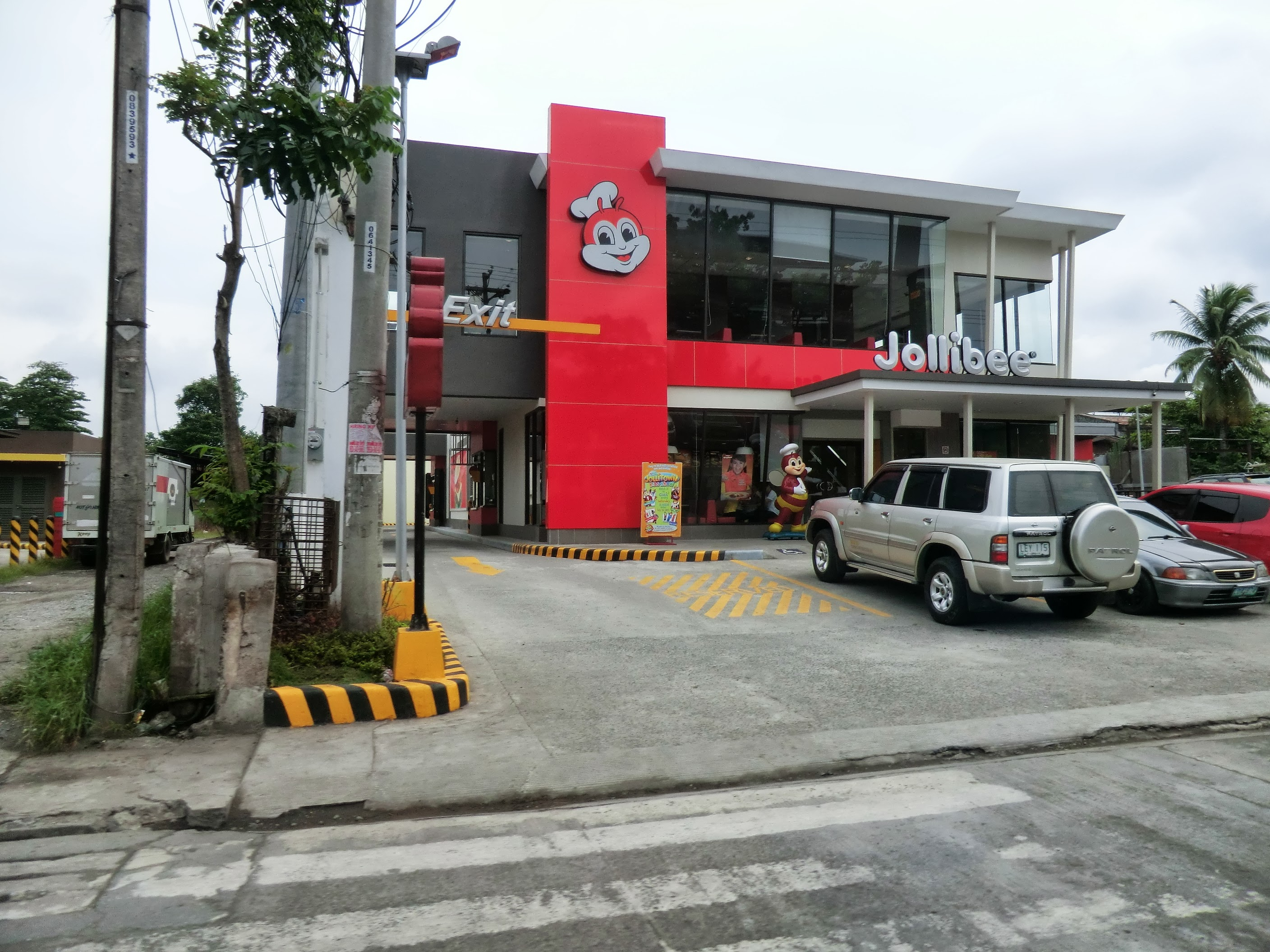 Ma-a, Talomo, Davao City, Davao del Sur, Philippines